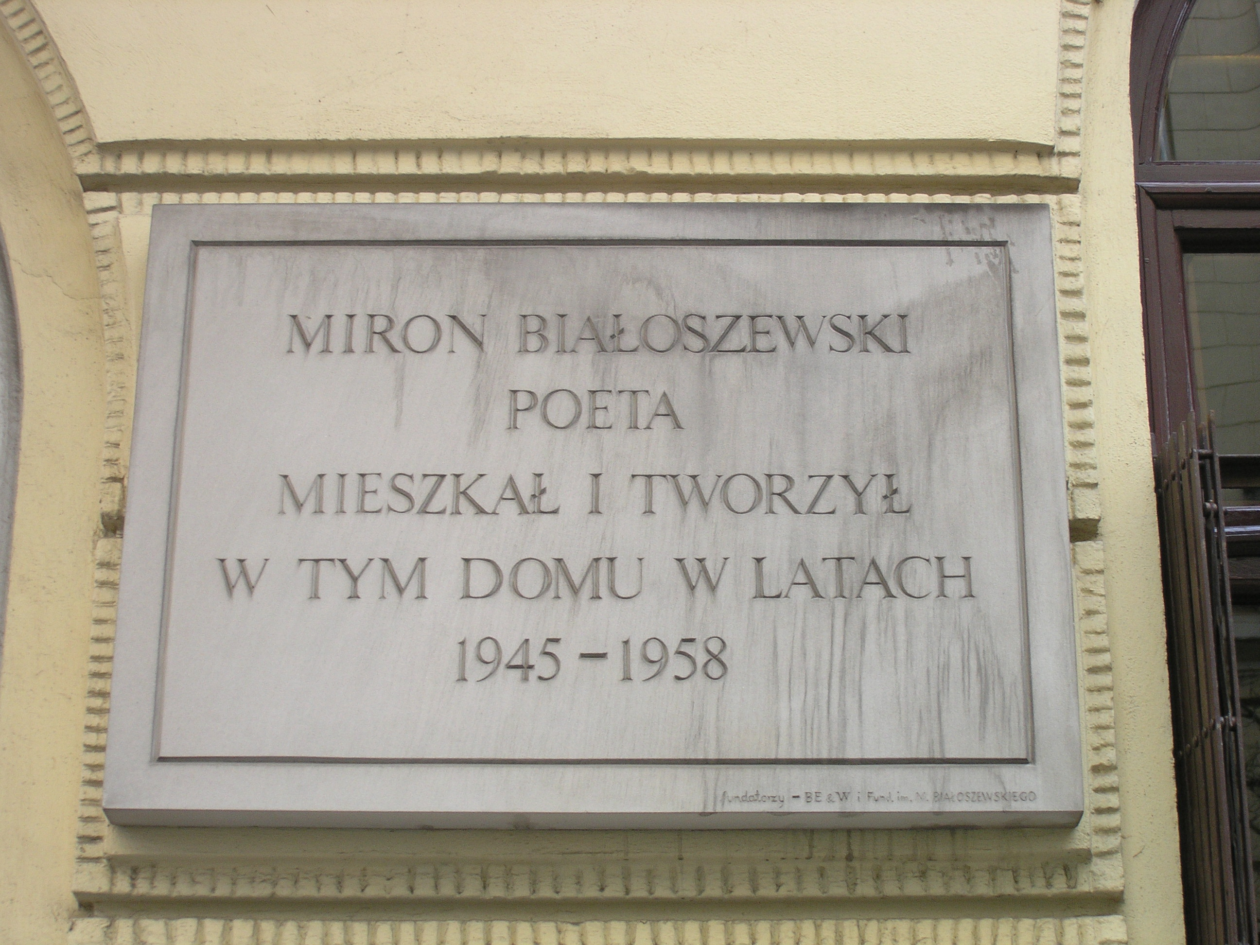 Tablica poświęcona Mironowi Białoszewskiemu na kamienicy przy ul. Poznańskiej 37 w Warszawie gdzie w latach 1945-1958 mieszkał poeta.